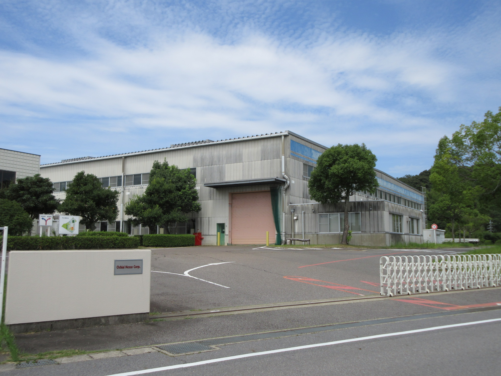 株式会社オチアイネクサス 本社（岡崎市真福寺町）